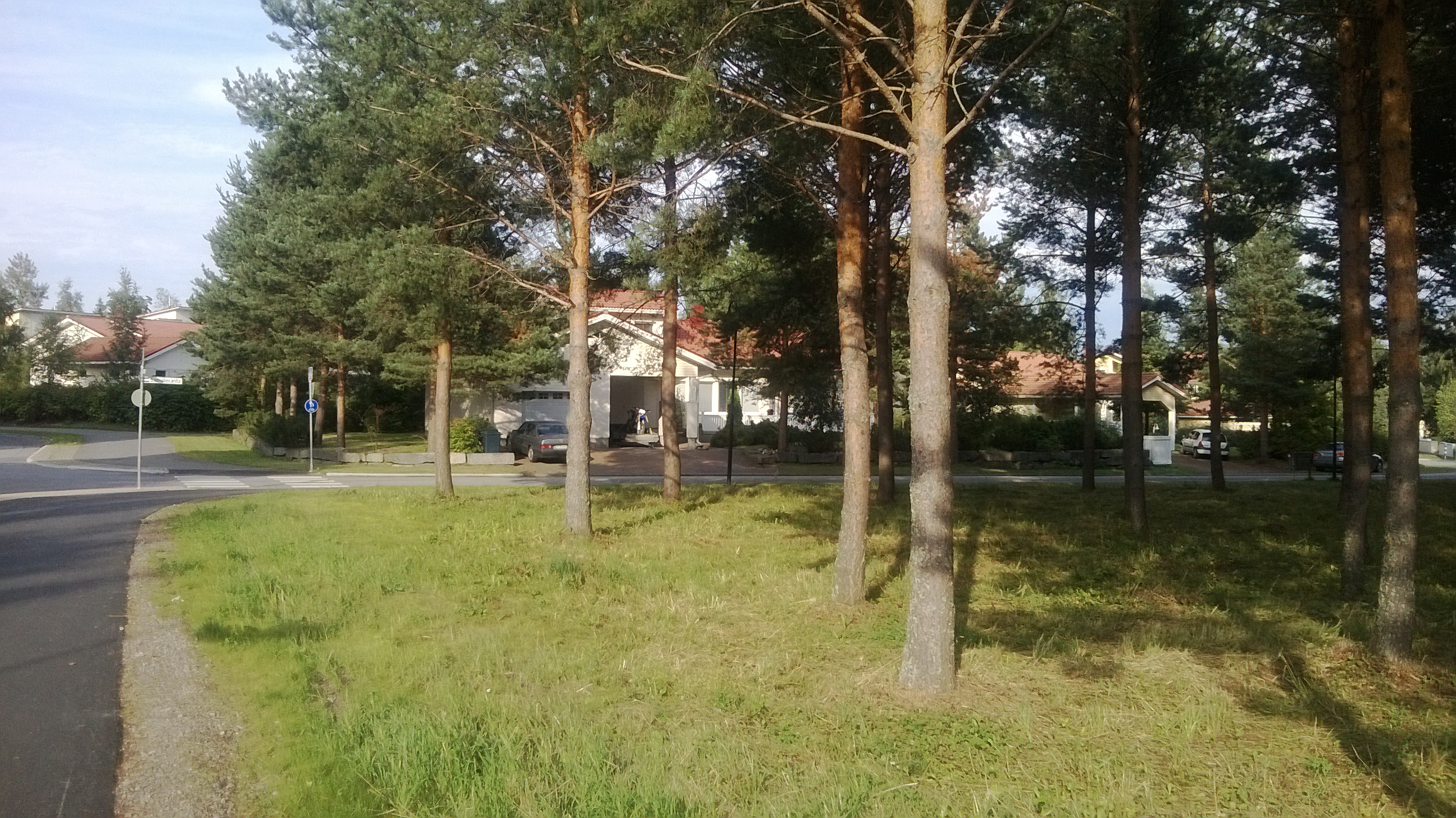 kaupunginosa Samulinniemi, Jyväskylä